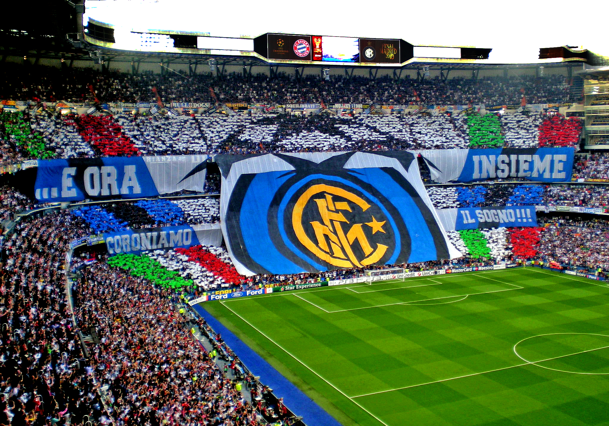 Coreografia dei tifosi dell'inter La curva Nord schierata al Santiago Bernabeu